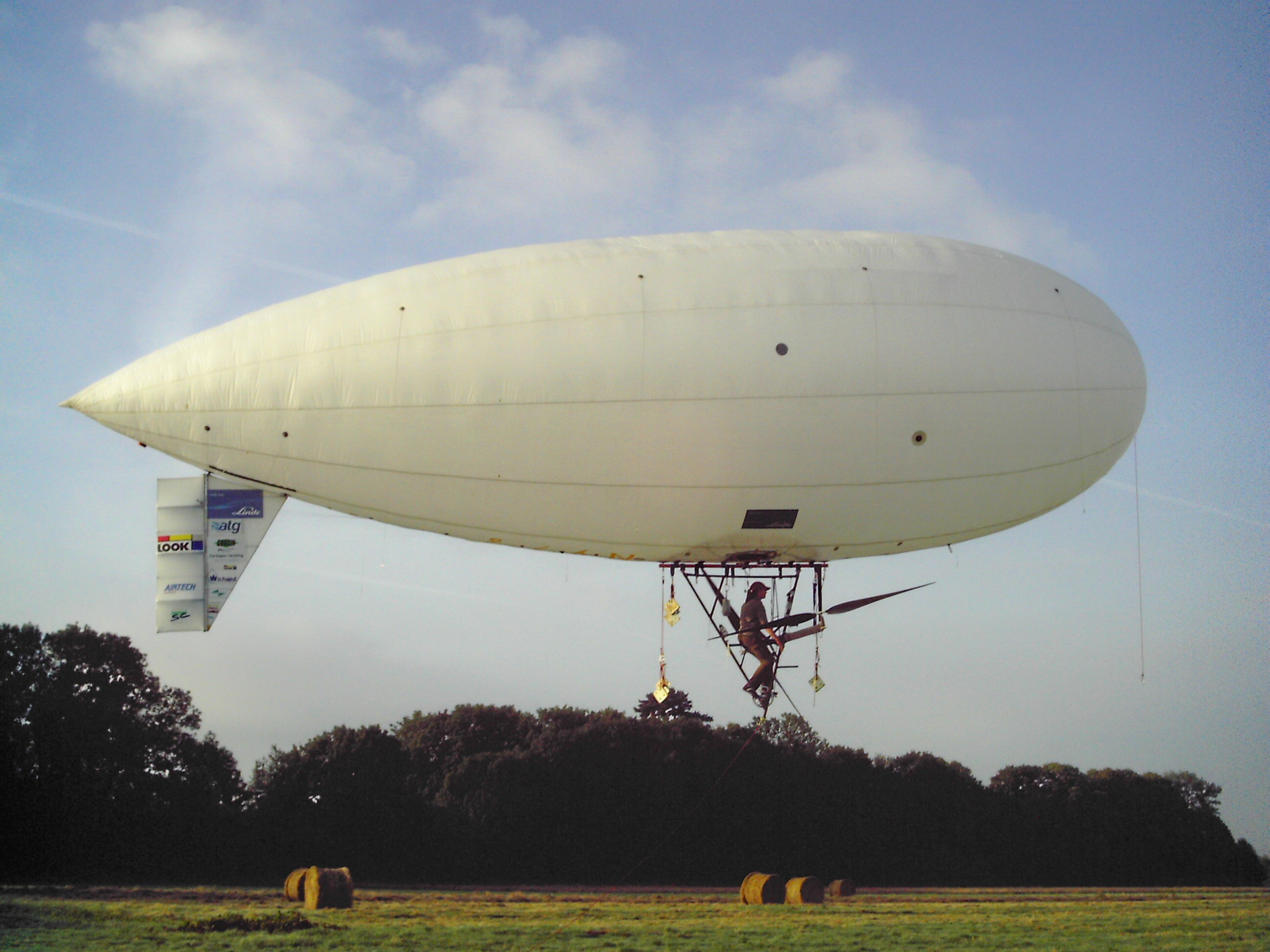 1ère série de vol du Mlle Louise Ballon dirigeable à propulsion humaine à Rouen Boos, le 4 juillet 2006 piloté par une journaliste de France 3 sous les indications du pilote constructeur Stephane Belgrand Rousson